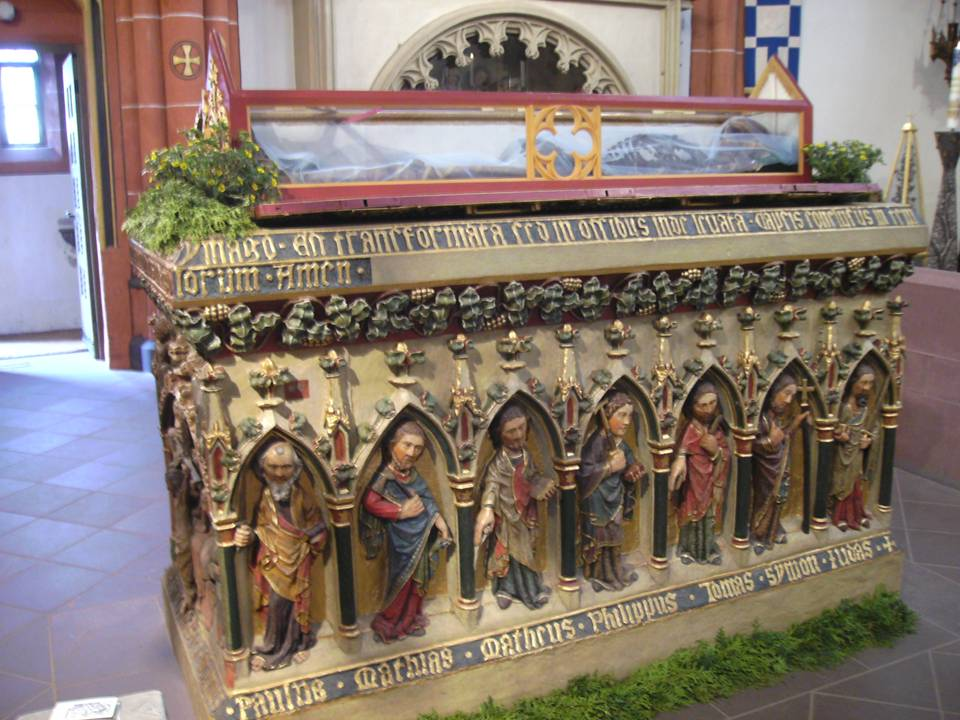 Tumba des Heiligen Wendlin mit seiner Reliquie